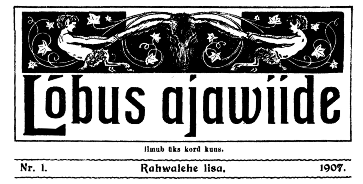 Lõbus ajawiide, esikaas